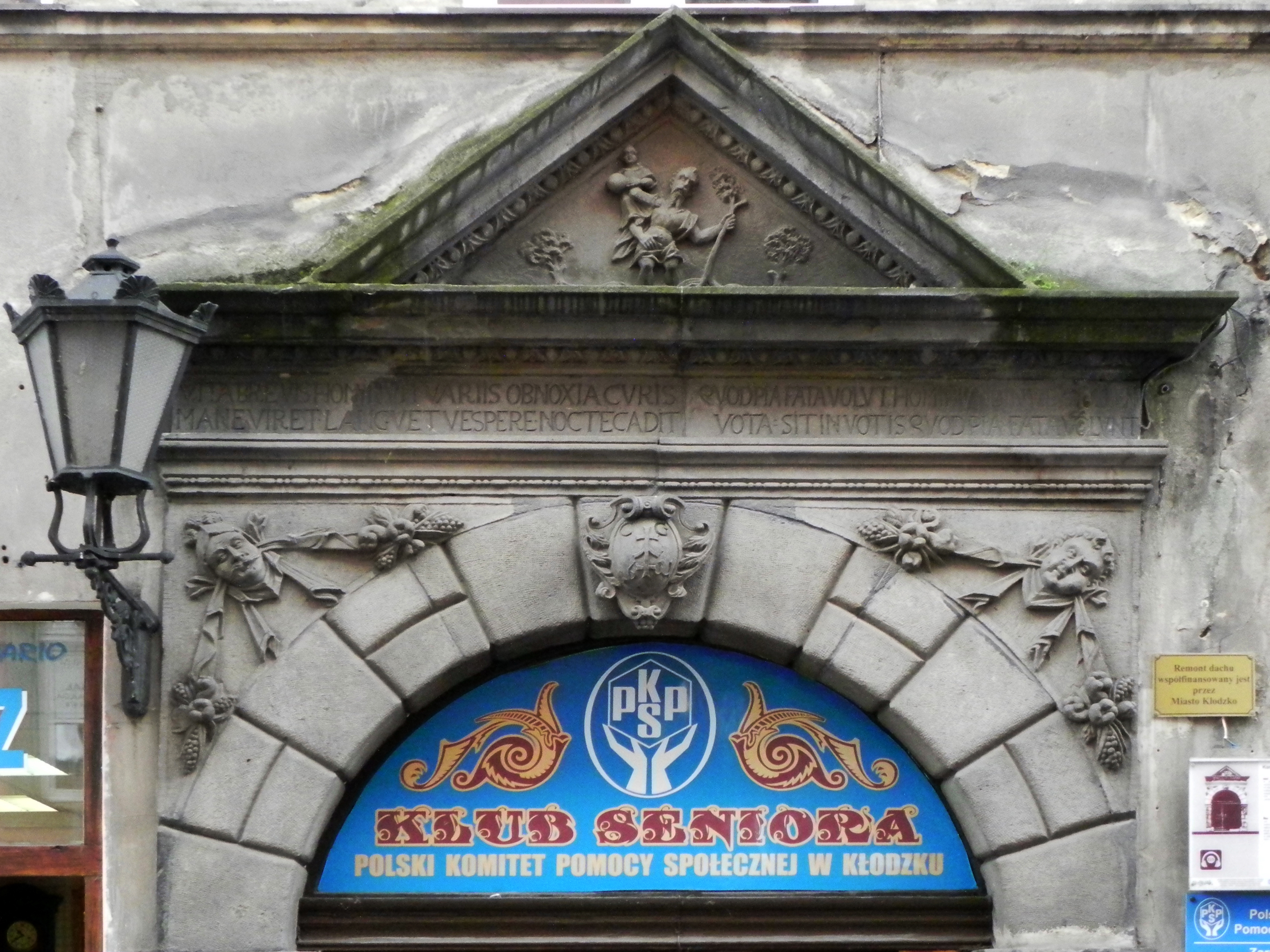 Kłodzko, dom, XVI, XIX